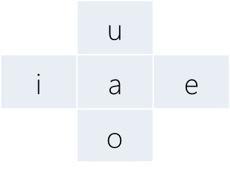 vowels layout on Japanese Flick input